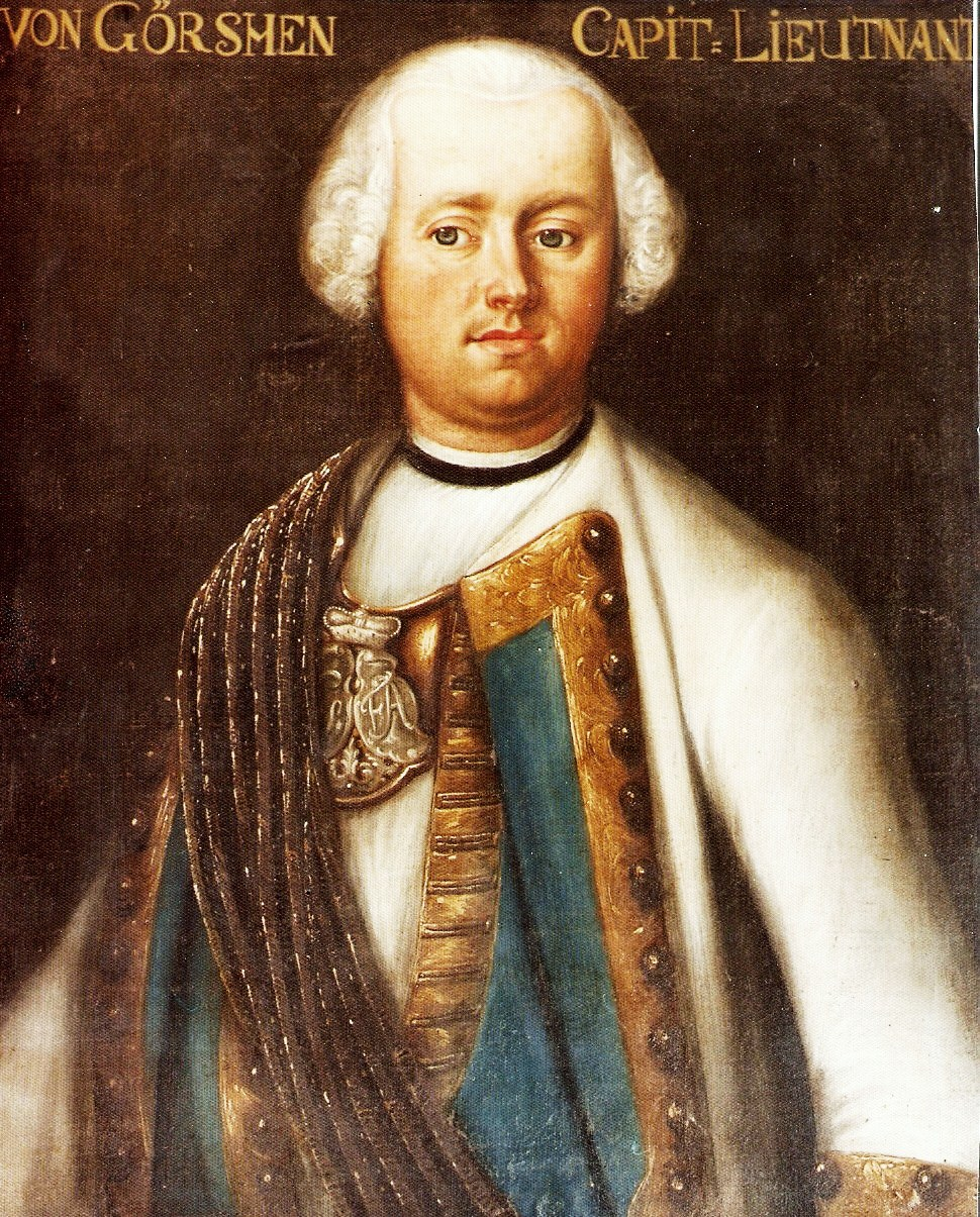 Scan einer Kopie eines Ölgemäldes; Ursprüngliche Anfertigung vor 1750